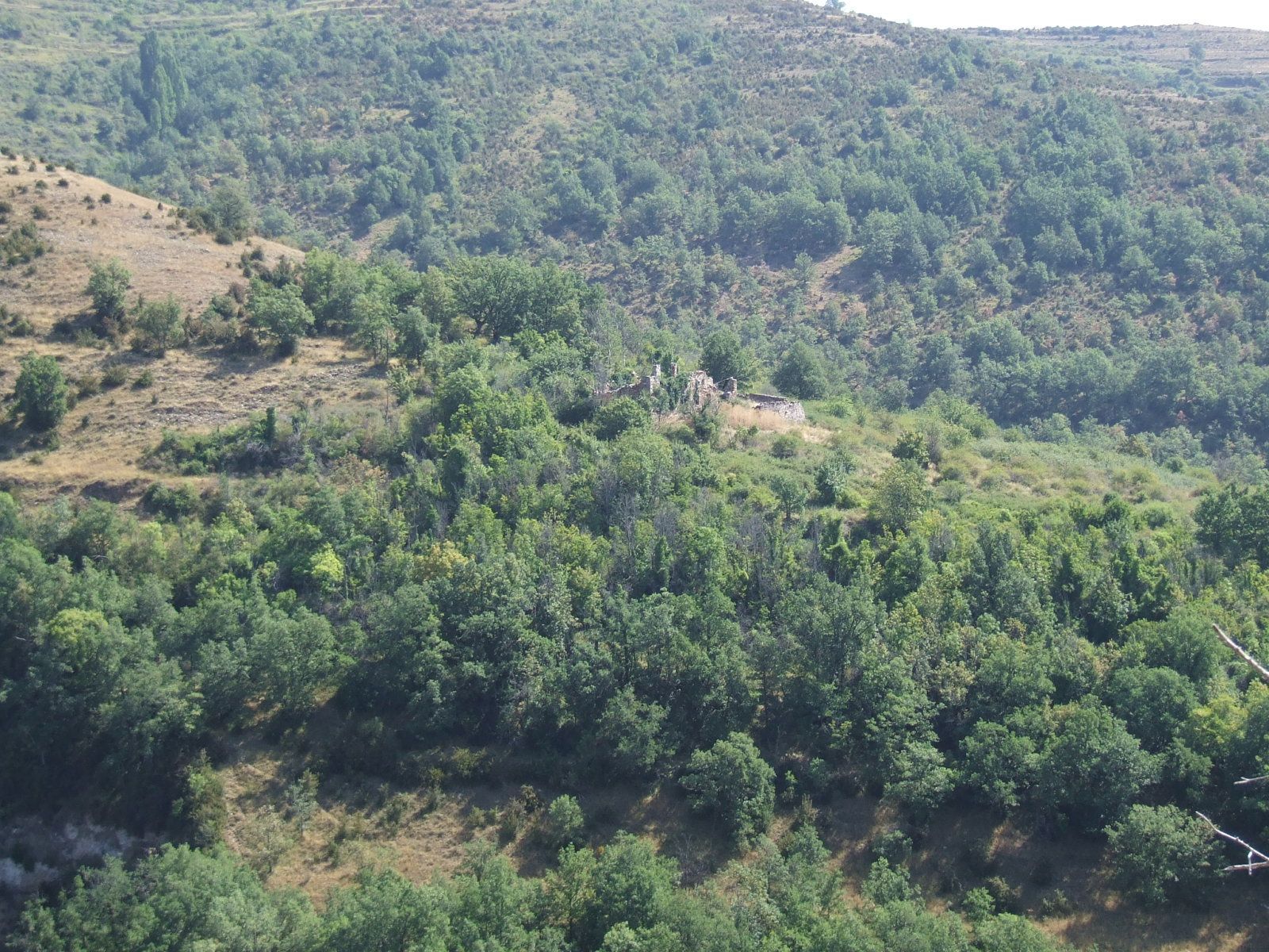 Les Bordes de Torres (Larén, Senterada, Pallars Jussà)